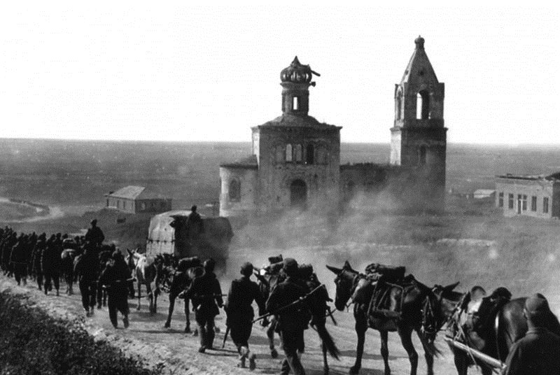 Войска Вермахта проходят мимо разрушенной церкви Сурб-Геворка в селе Султан-Салы